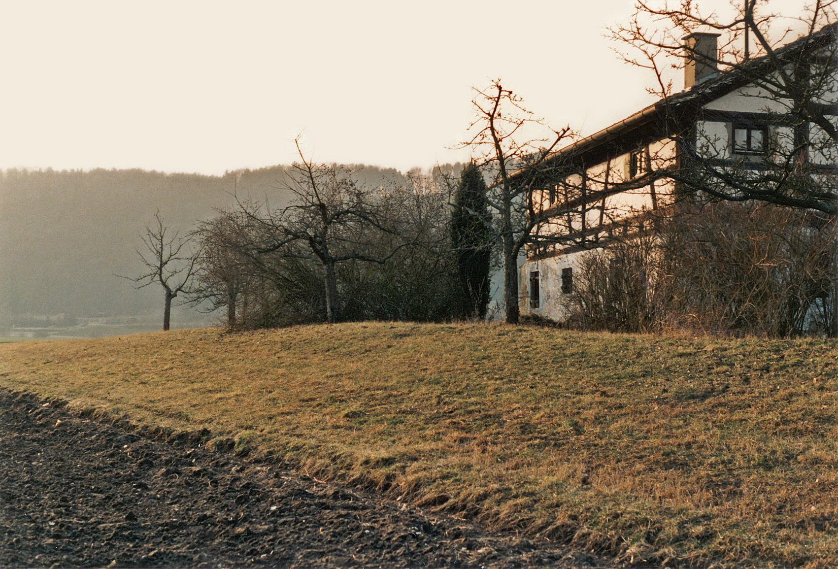 Südostwall des Limeskastells Böhming, Altmühltal. Zustand im Januar 1993.